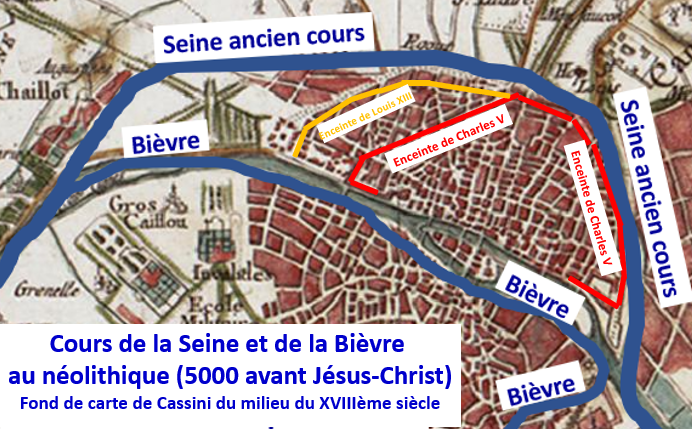 Ancien cours de la Seine, de la Bièvre, des enceintes de Charles V et de Louis XIIII sur fond de carte de Cassini